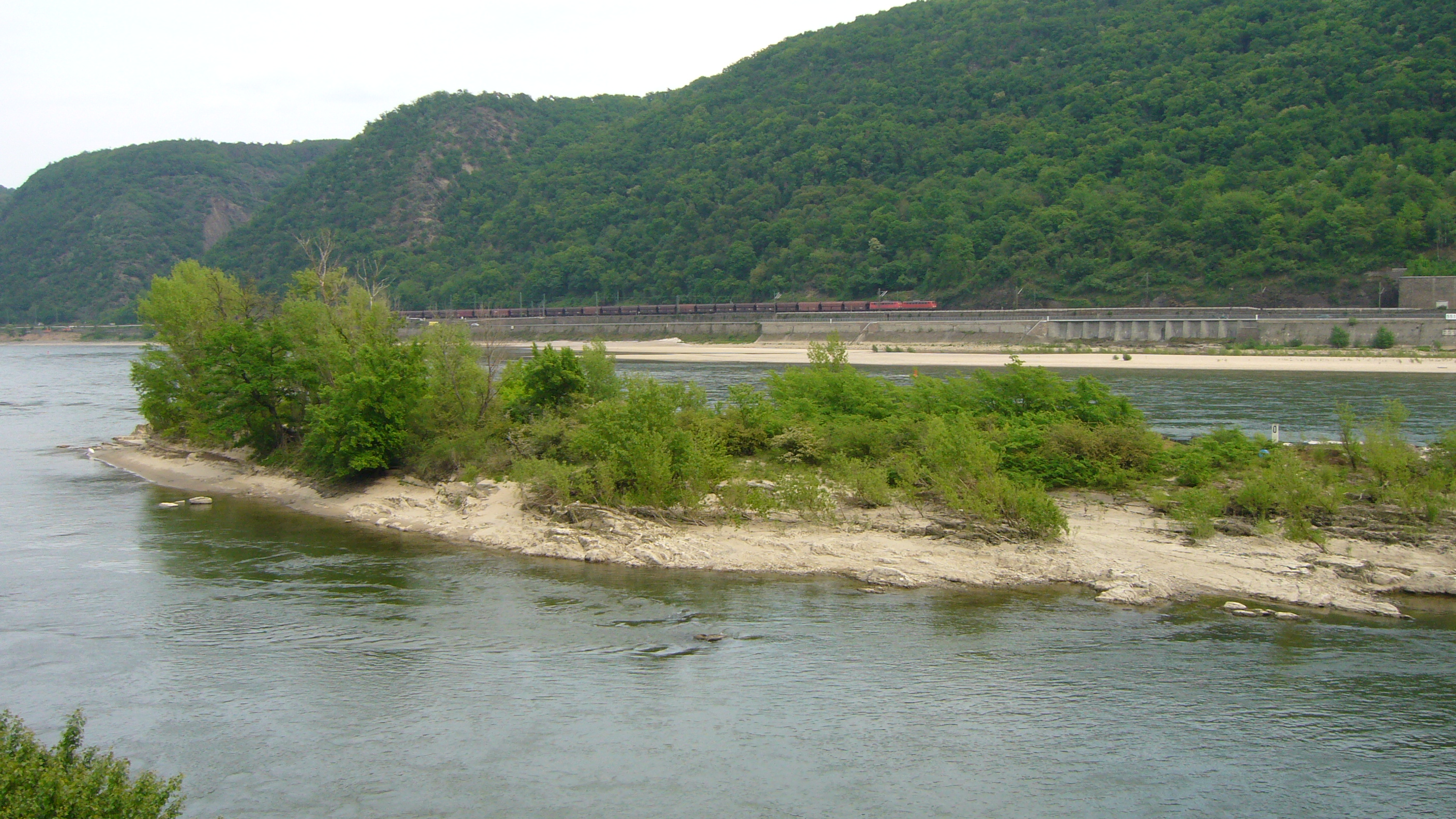 Tauberwerth